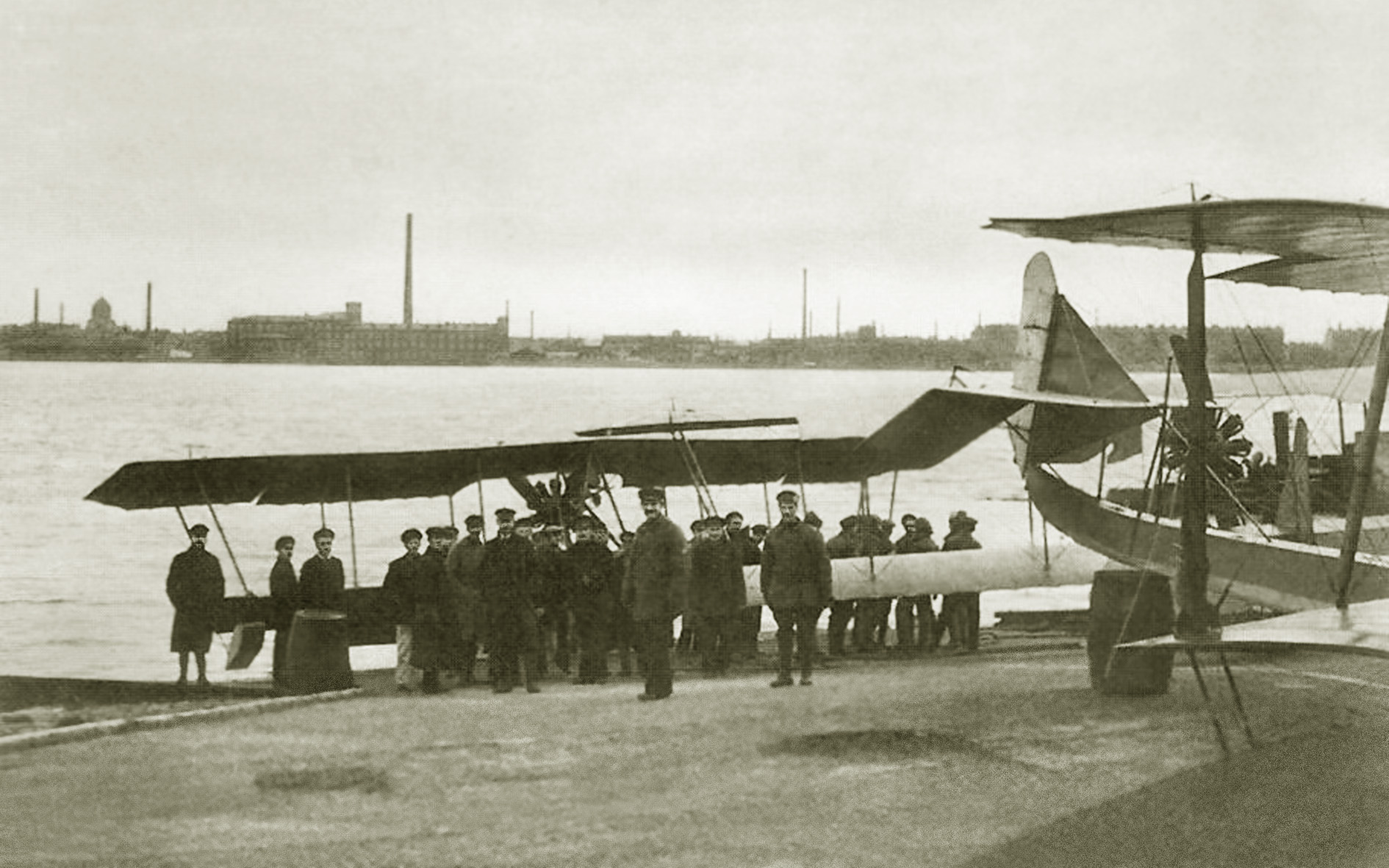 Петроград, Гутуевский остров. Будни Офицерской школы морской авиации. На заднем плане побережье Васильевского острова, слева купол церкви Милующей Божией Матери